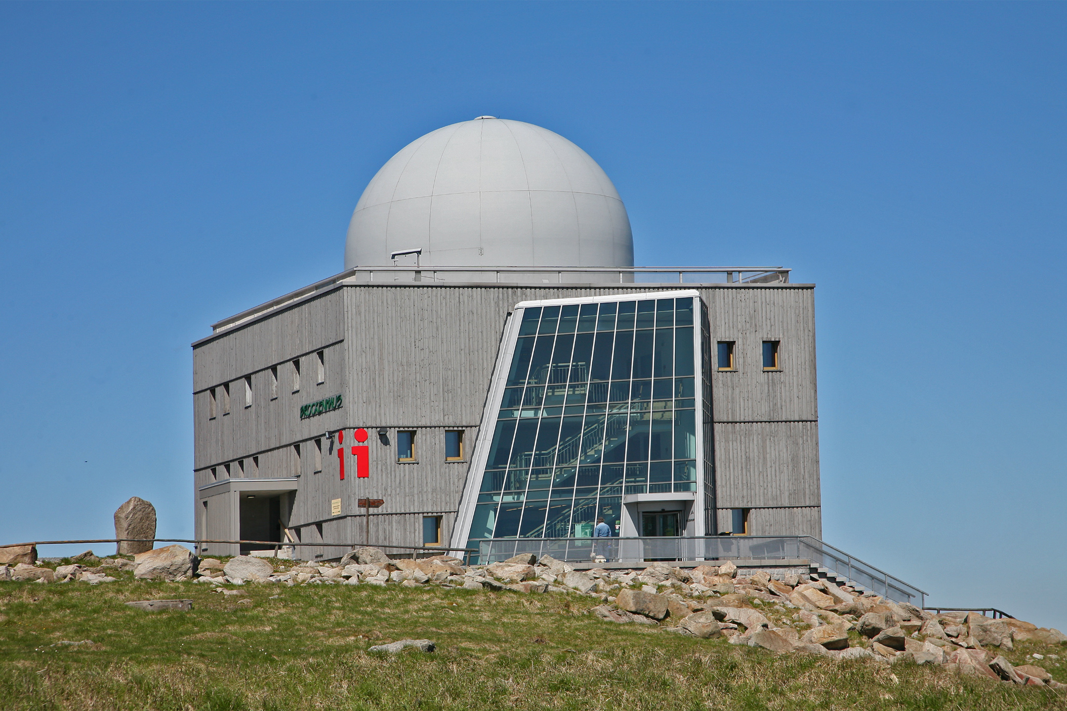 Die ehemalige Abhöreinrichtung der DDR auf dem Brocken ist heute eine Informationszentrum und Museum des Nationalparks Harz.